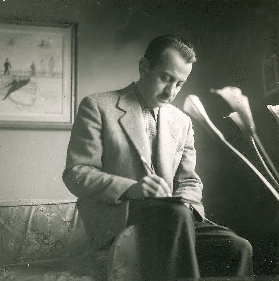 El escritor chileno Juan Tejeda en su casa de calle Valentín Letelier en Santiago